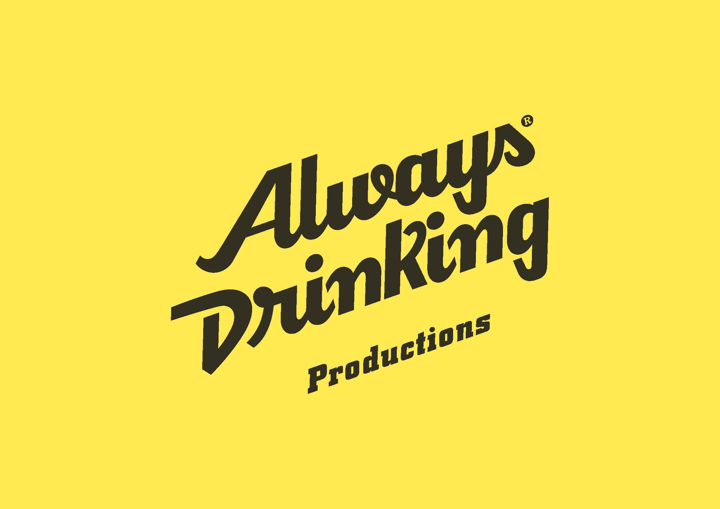 logo